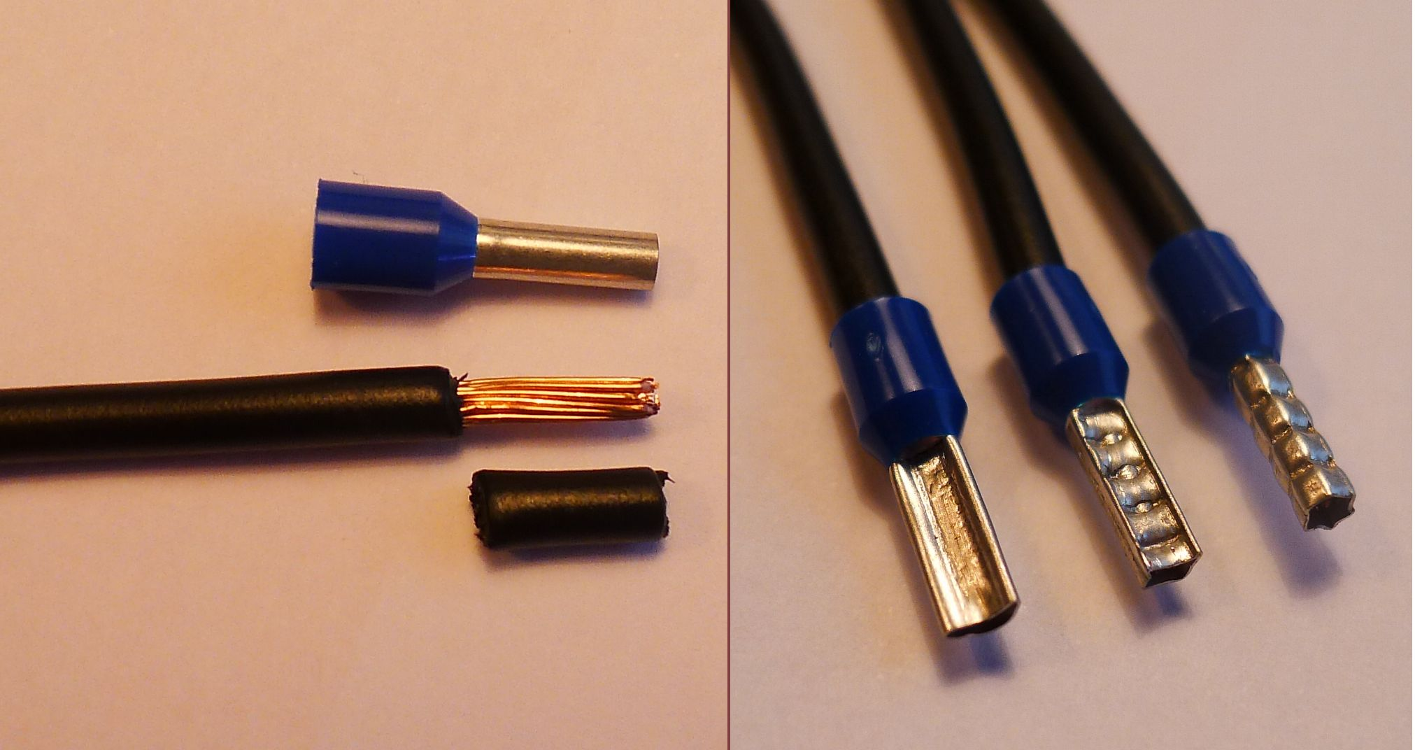 Het aanbrengen van een adereindhuls in twee stappen